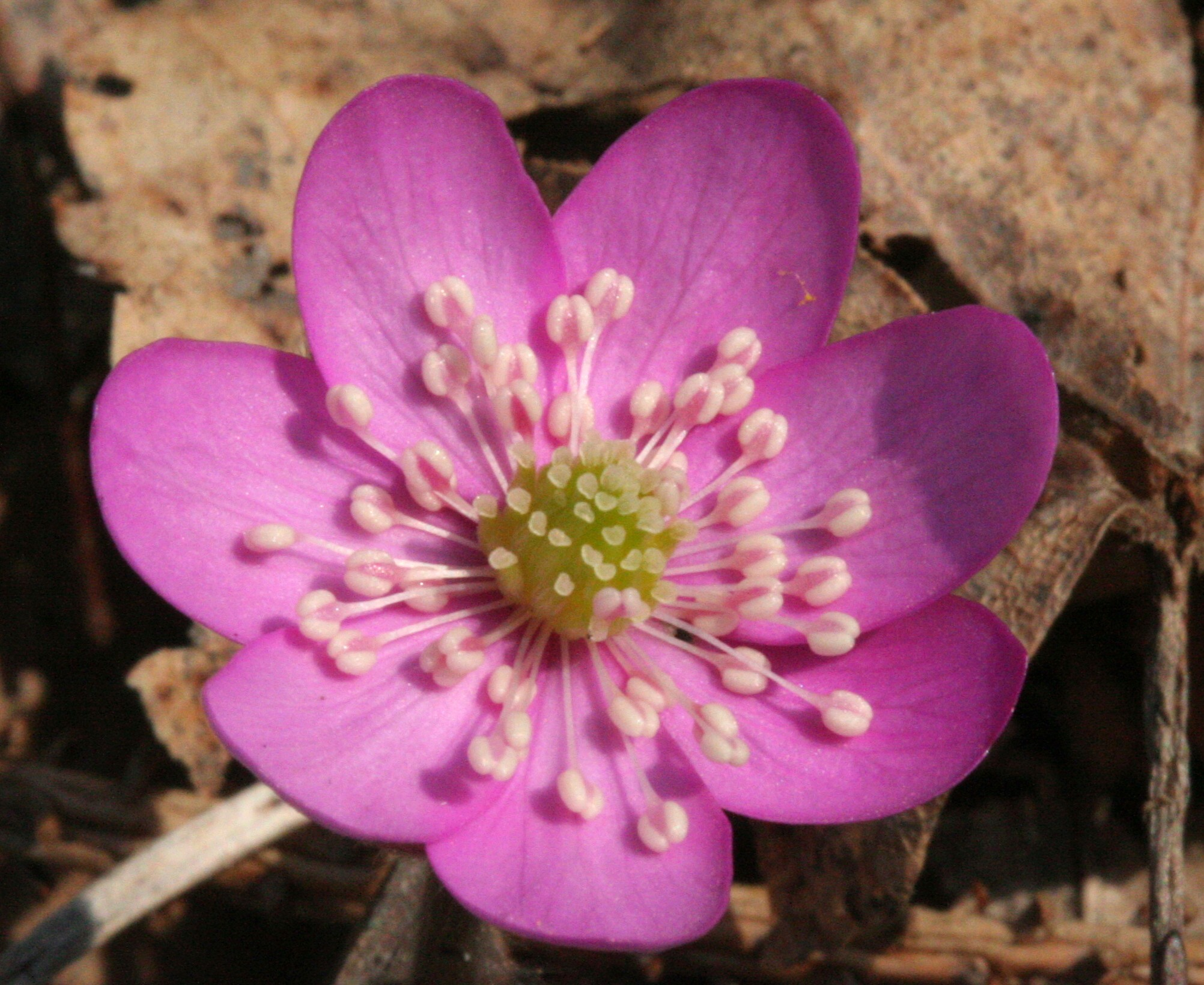 Erba trinità - Località : Le Laste, Limana (BL), 661 m s.l.m.